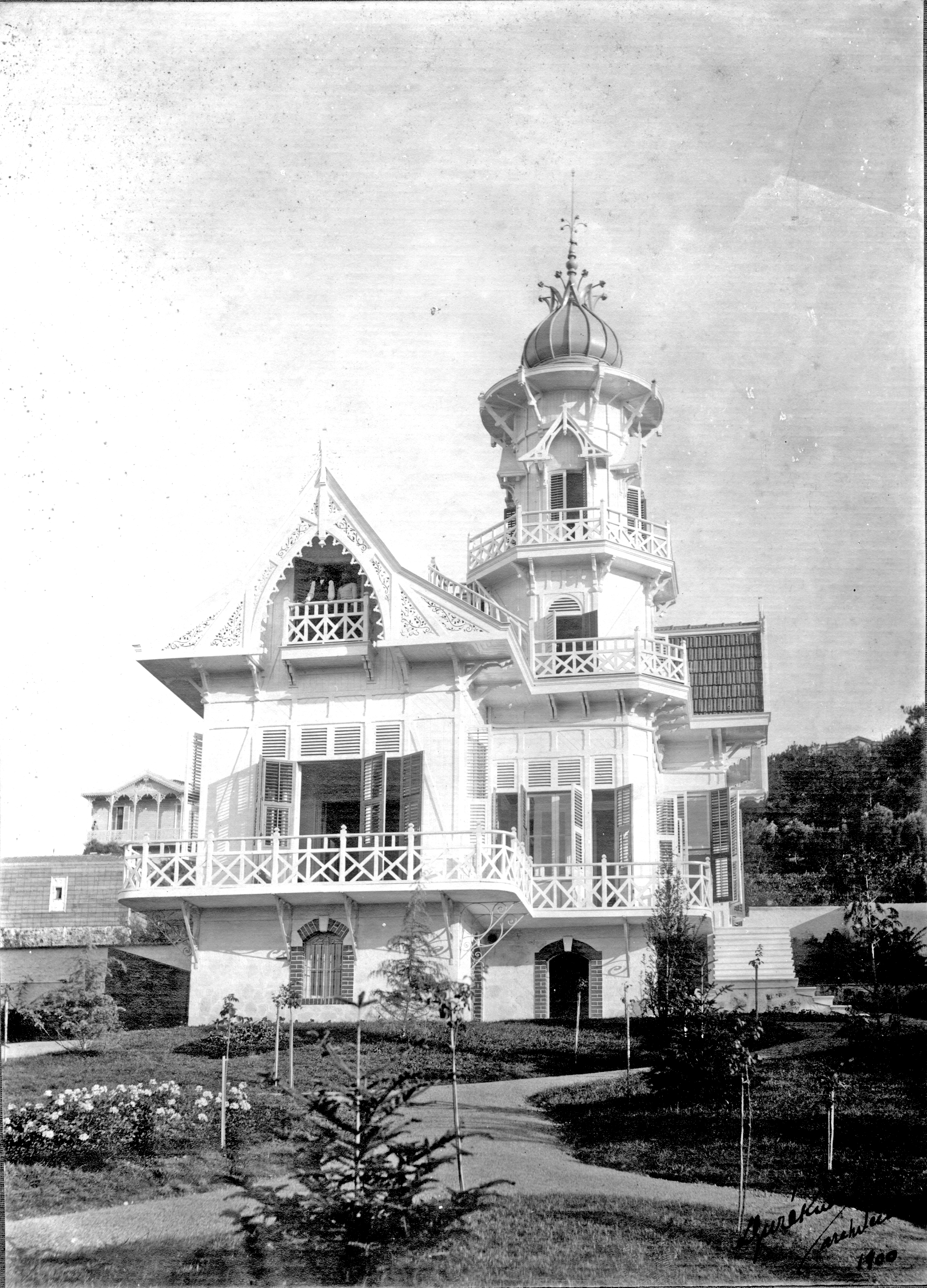 Léon Gurekian - Villa Moustafa Bey - Prinkipo